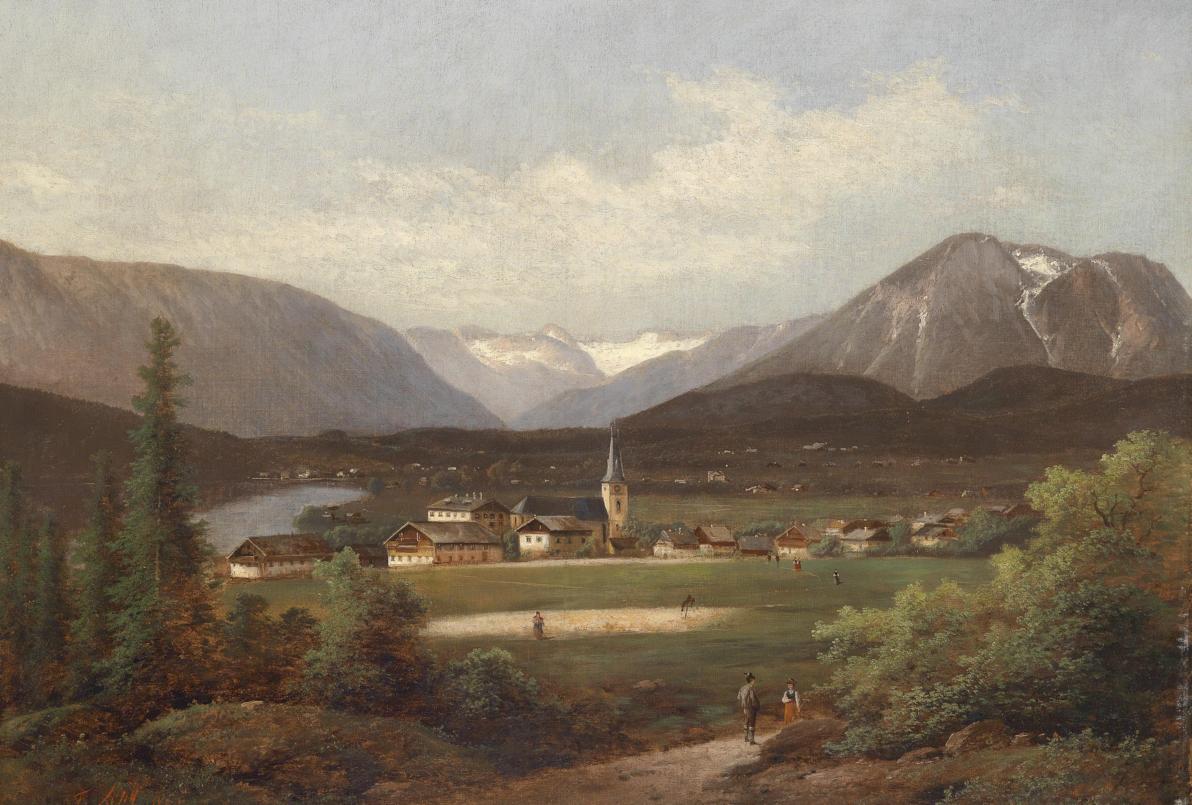 Blick über den Altausseersee, signiert, datiert F. Lepie 1883, Öl auf Leinwand, 74 x 100 cm